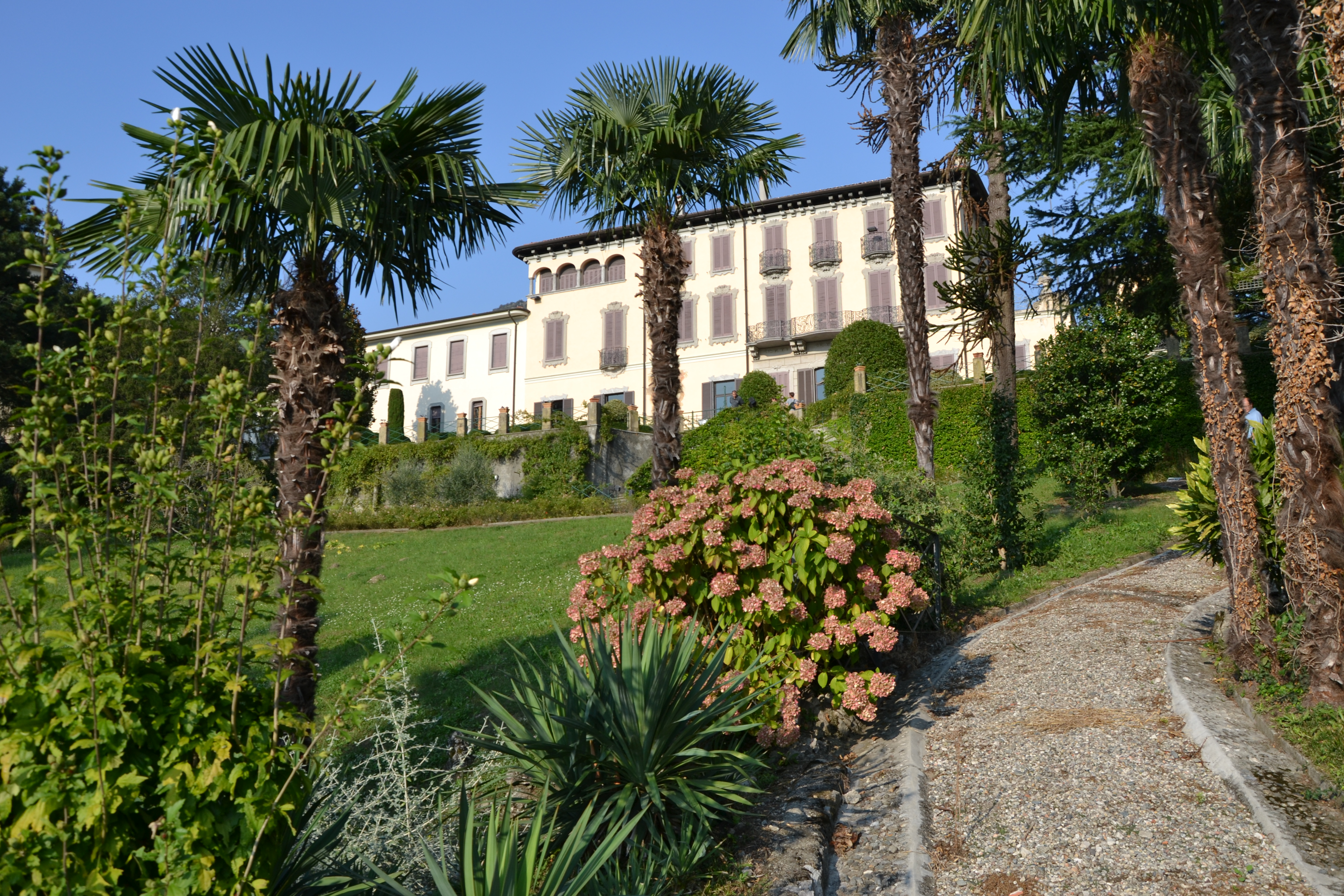 Villa Bertarelli. ubicata in comune di Galbiate, ospita la sede del Parco Monte Barro